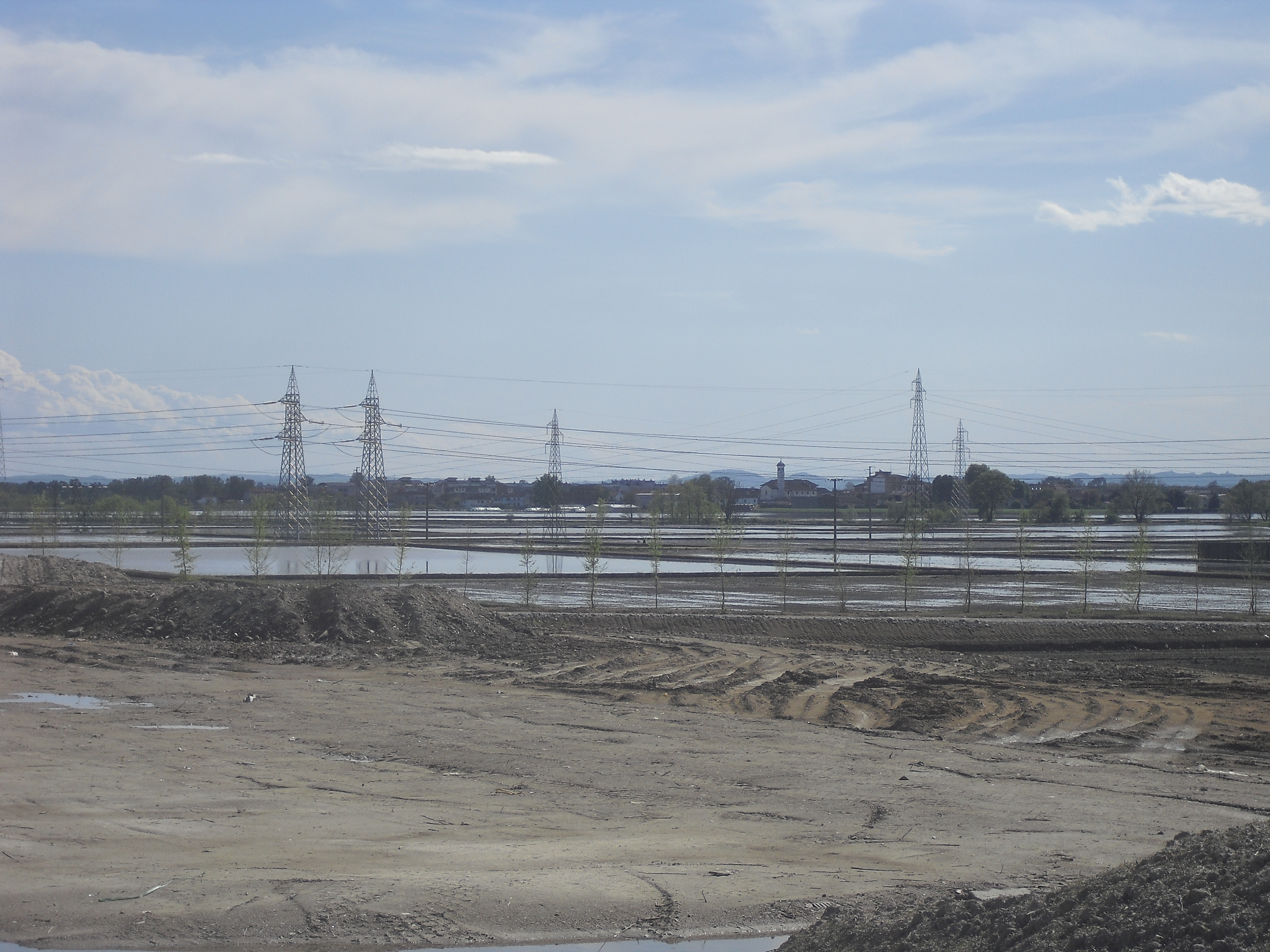 il Basso Novarese con la piana dell'Agogna